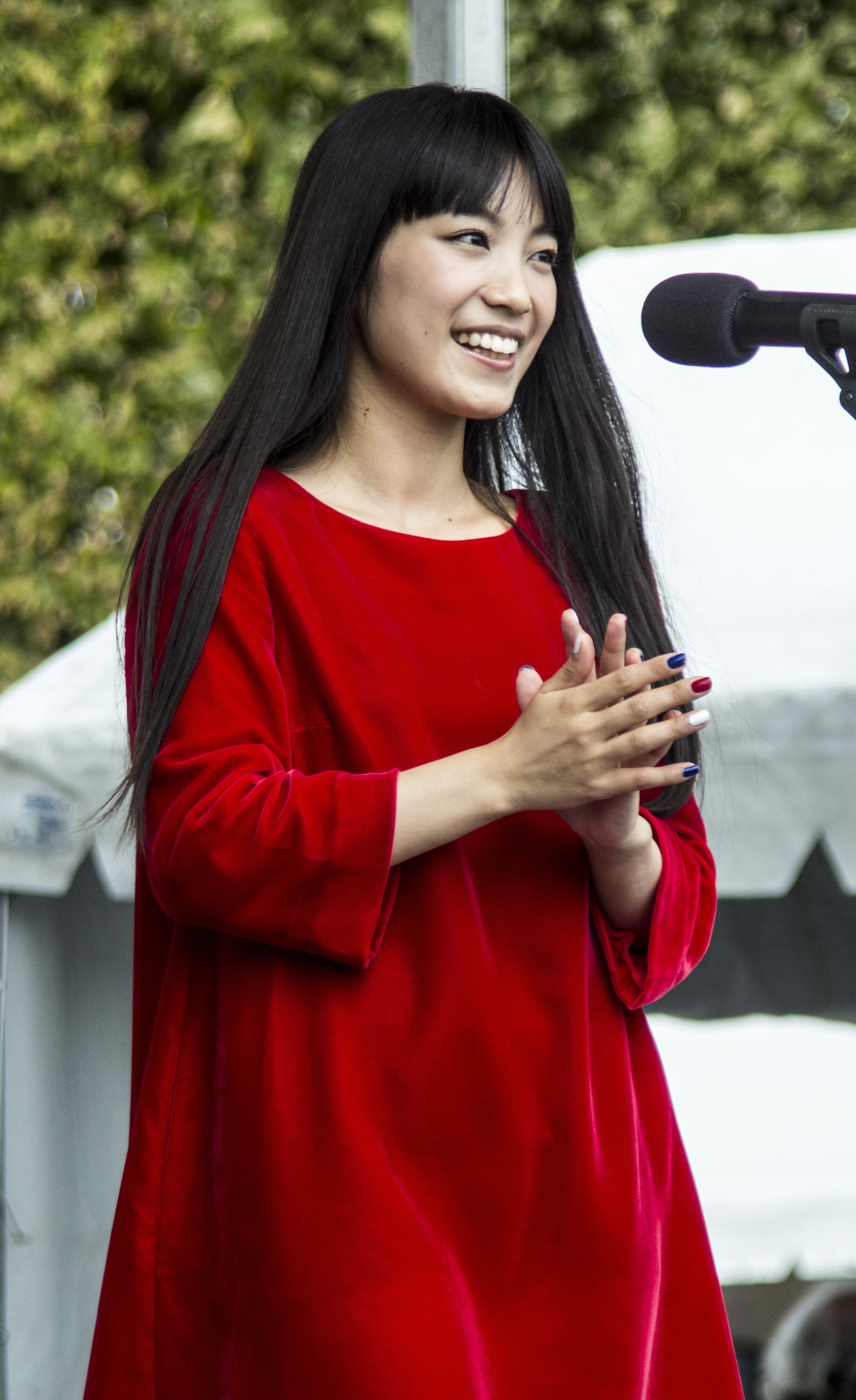 "Tohoku-Wa La renaissance"